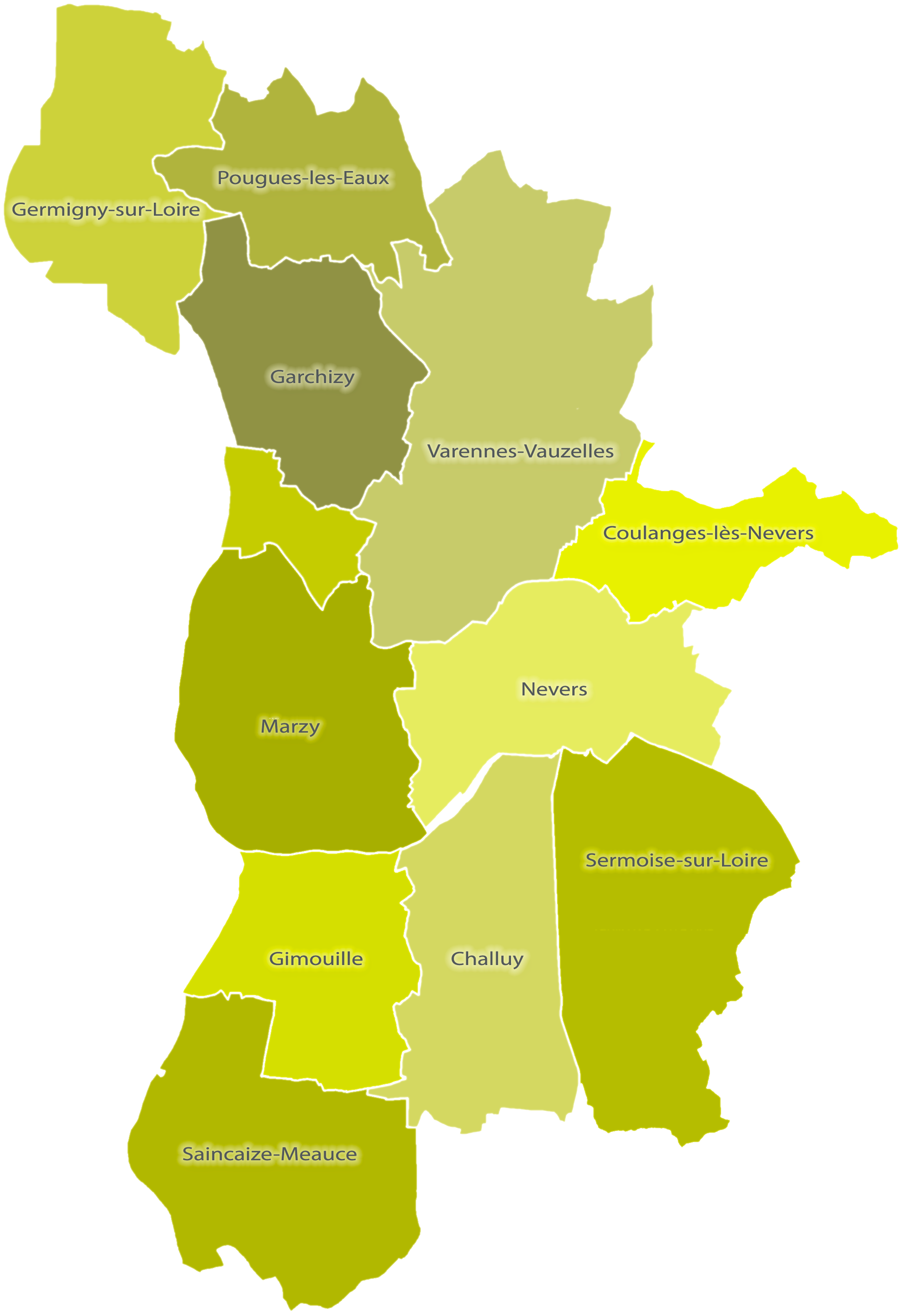 Territoire de Nevers Agglomération - Communes